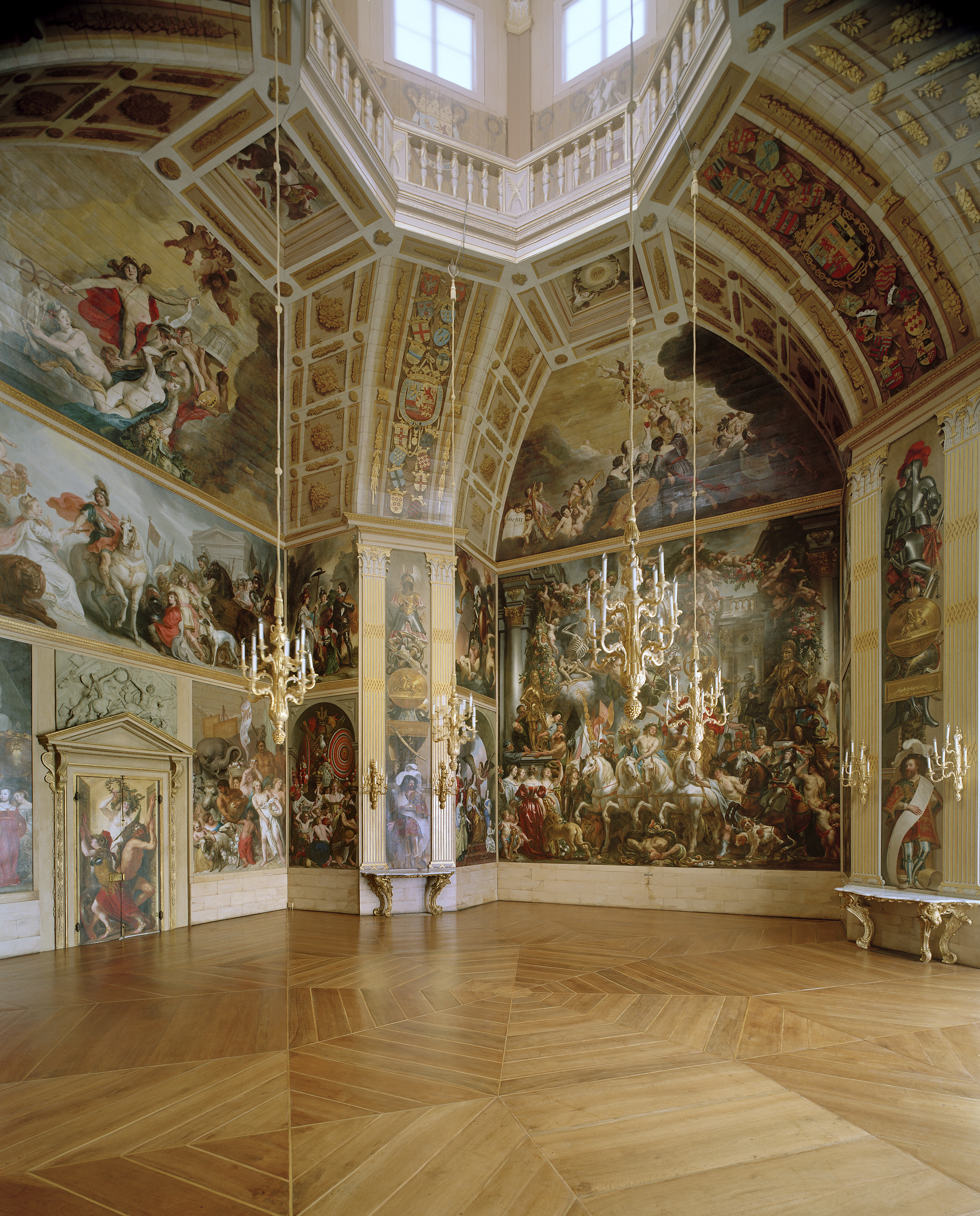 Huis ten Bosch: Oranjezaal na de restauratie: overzicht noordoosthoek, met de hele oostwand